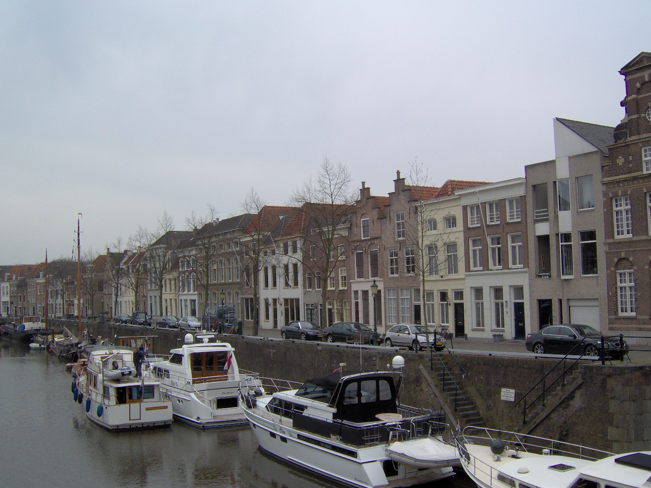 Huizen aan de Bredehaven in Den Bosch. Eigen foto